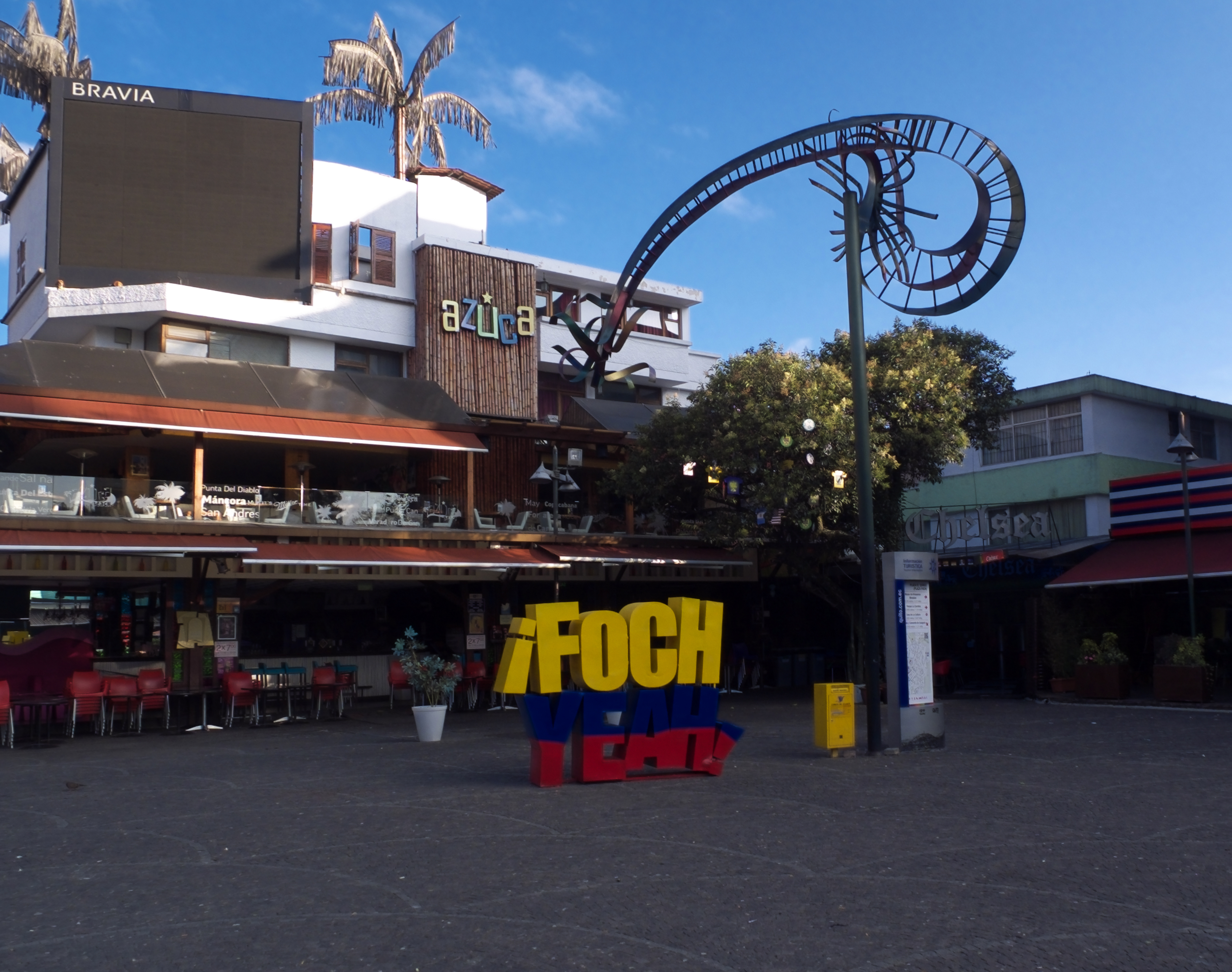 Plaza Quinde (La Mariscal), al amanecer. Esta plaza es conocida popularmente como Foch y se encuentra ubicada en el cruce de las calles Mariscal Foch y Reina Victoria, en Quito (Ecuador). Es famosa por su vida turística y nocturna.